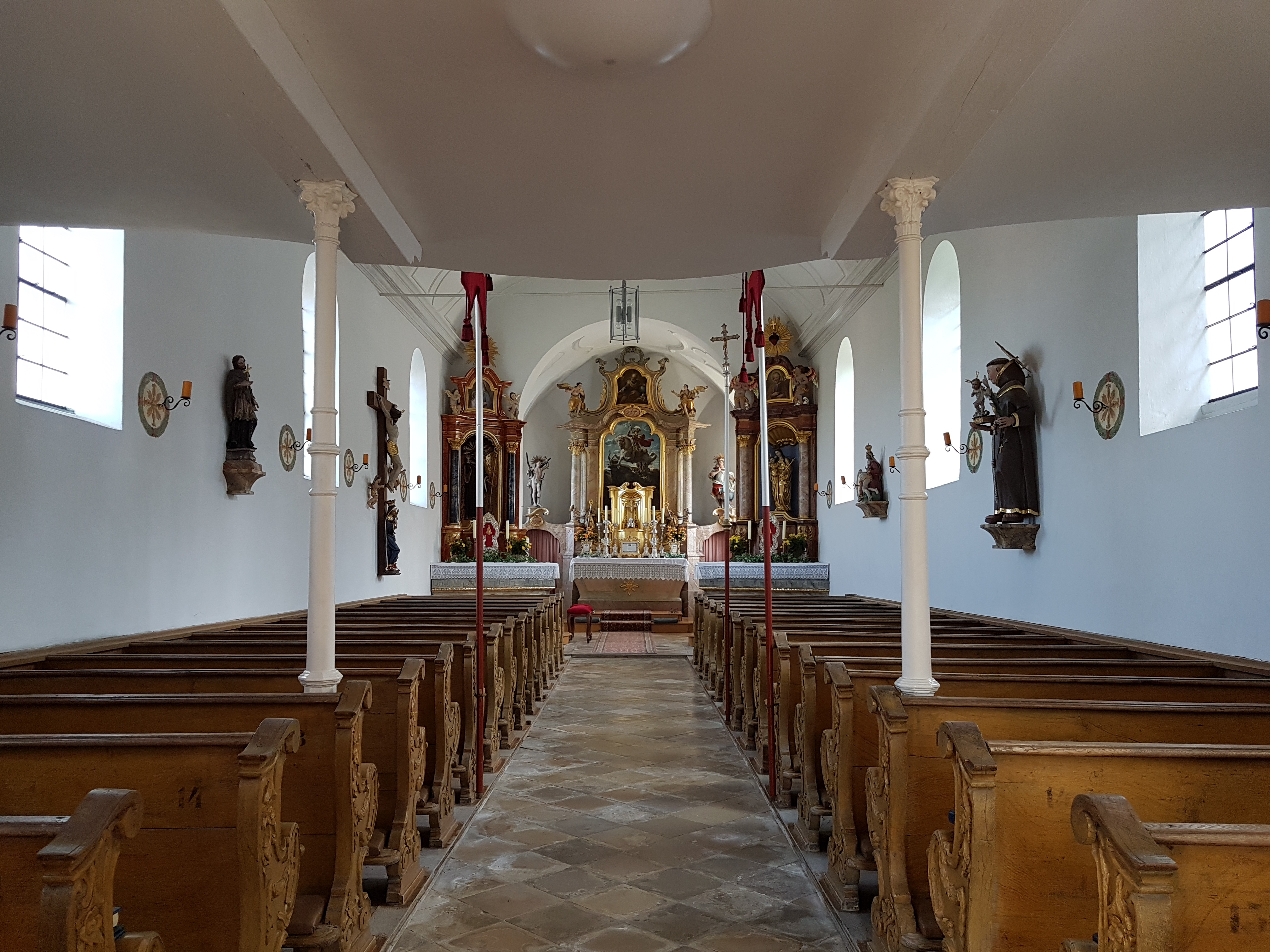 Großweil, alte Georgskirche